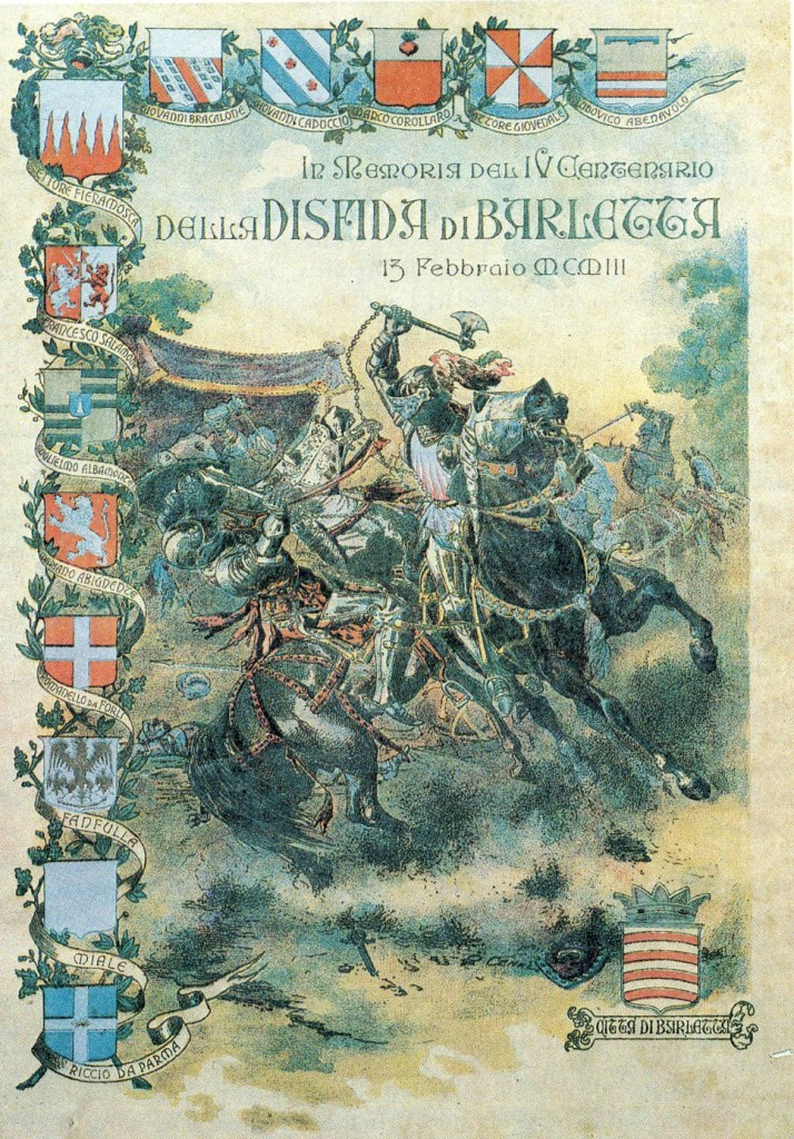 Manifesto commemorativo del IV centenario della Disfida di Barletta. Copyright scaduto. L'immagine è un manifesto del 1903 che ho tratto dal libro "La Disfida di Barletta" di R.Russo edito da Editrice Rotas, 1994, Barletta.